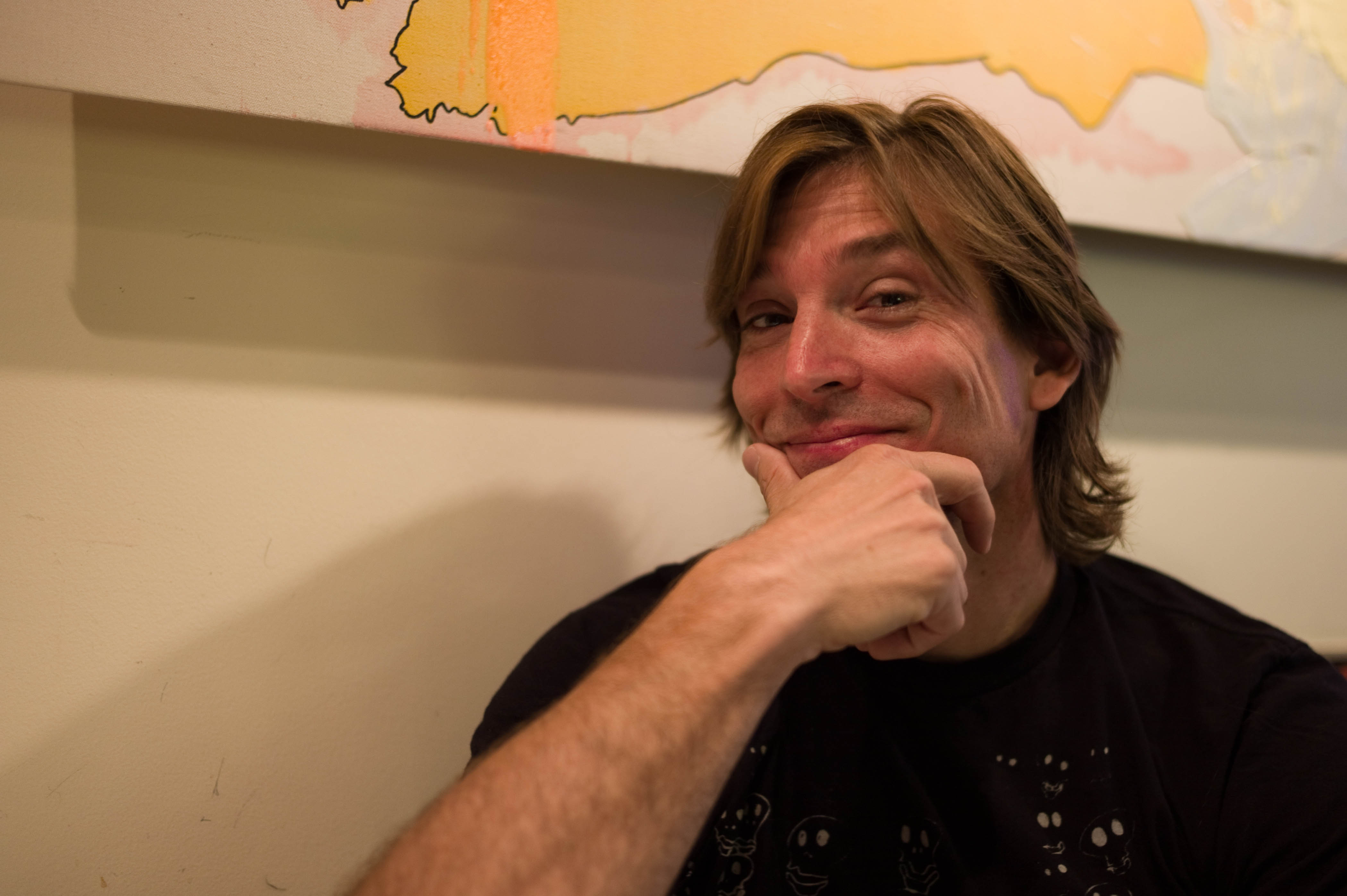 Alex Bogusky